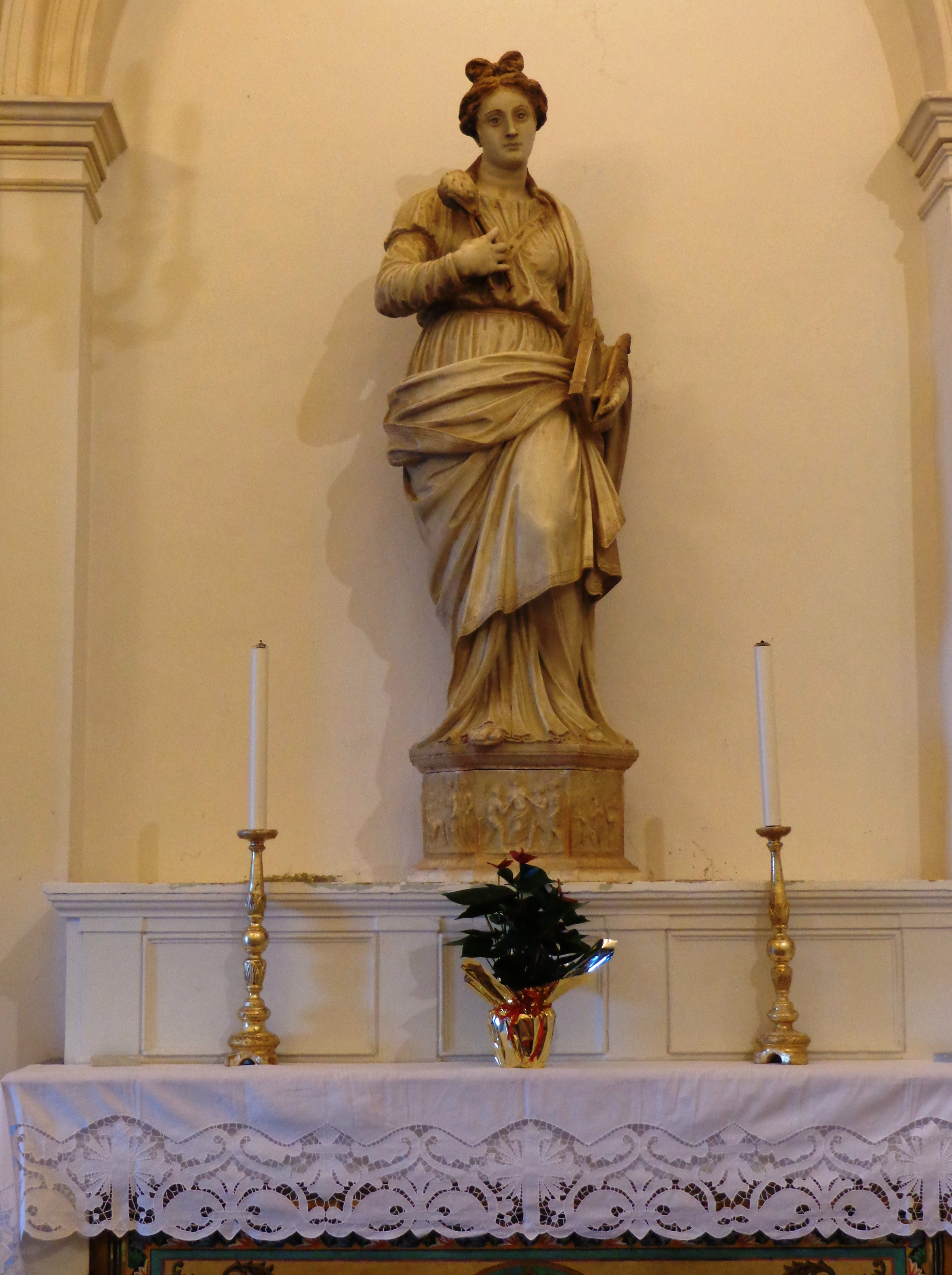 S.Agata_Castroreale_02